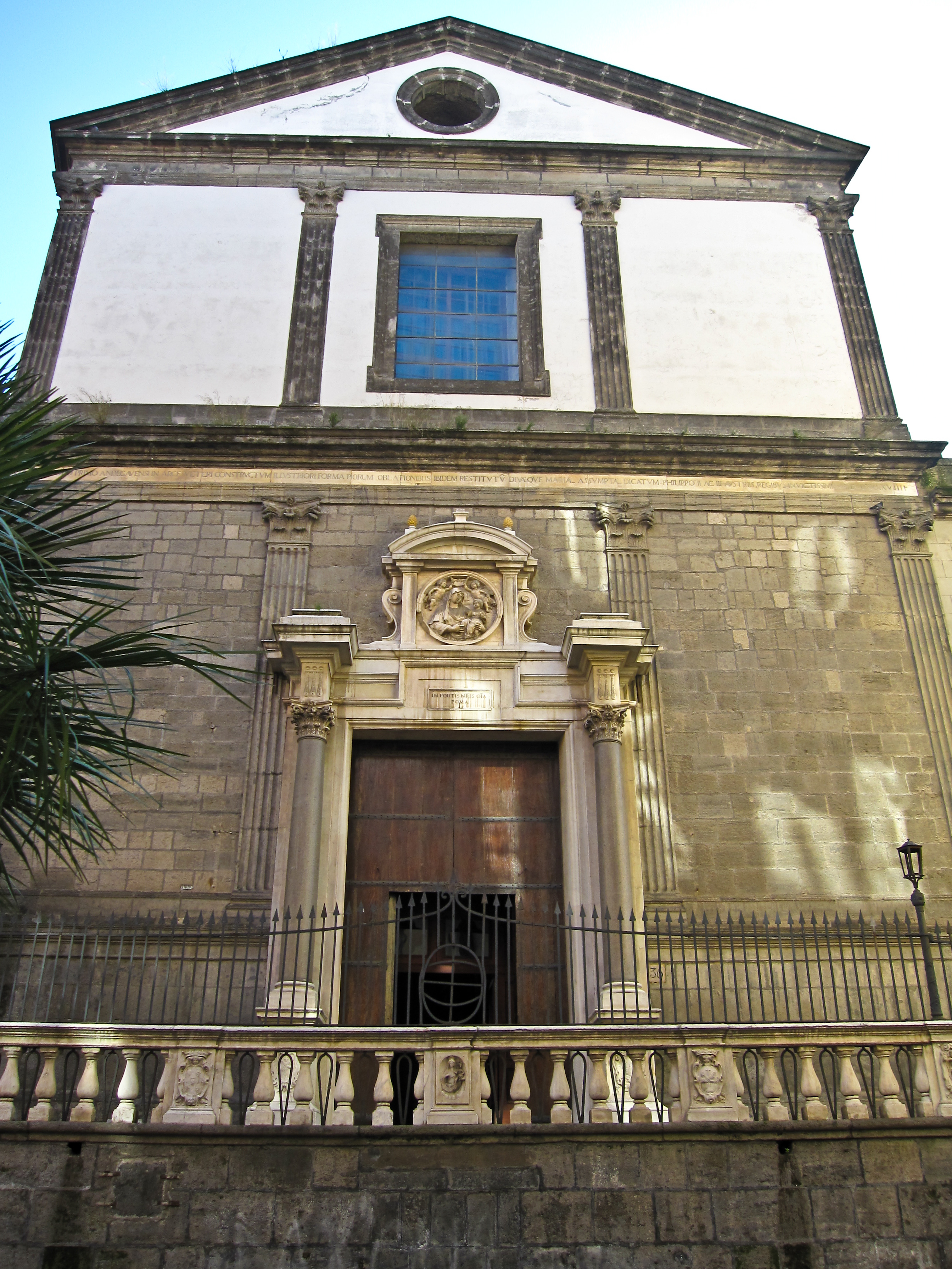 Facciata della chiesa di Santa Maria la Nova (Napoli)